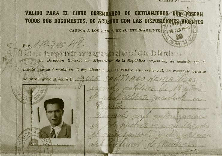 Entrada en La Argentina el 10-2-1949. José Santiago Neira Vilas tiene veinte años.